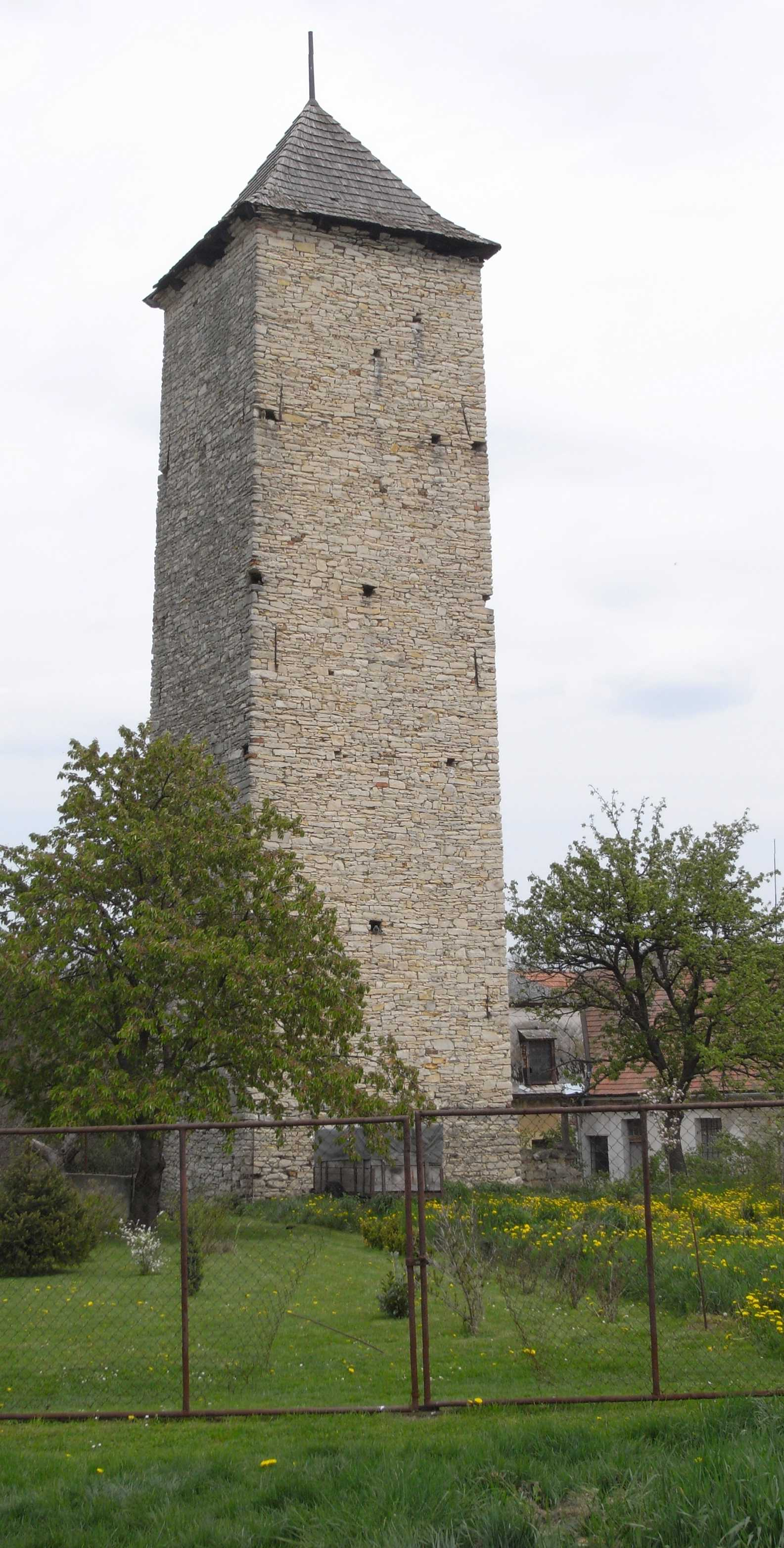 Wasserturm in Chrastice, OT Chrašice